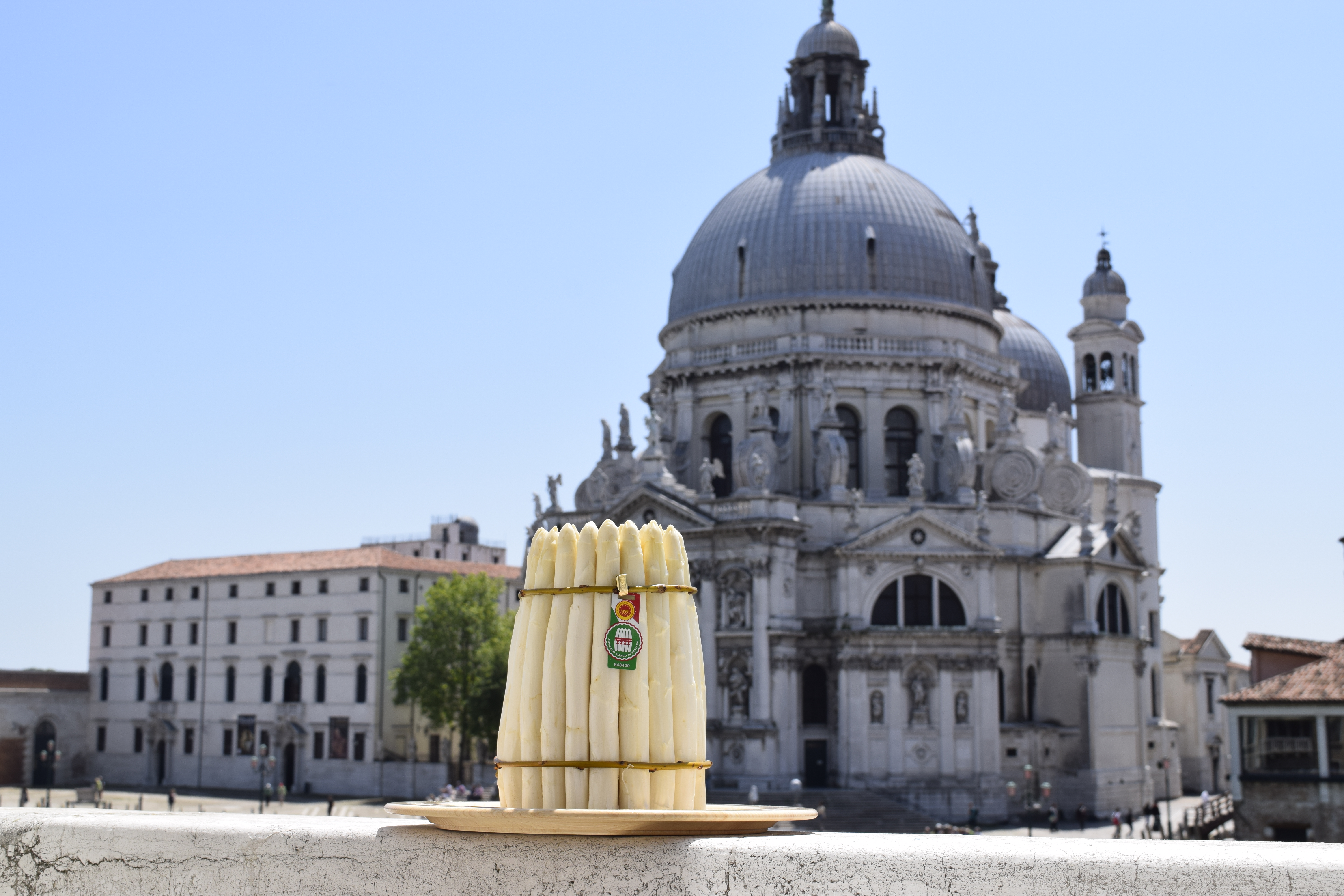 Mazzo di Asparagi Bianchi di Bassano DOP